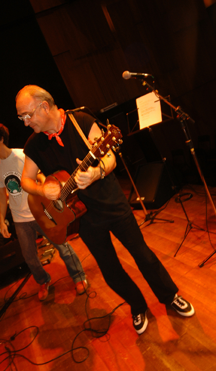 joaoricardocomvanguardnoccbbsaopaulomaio2007